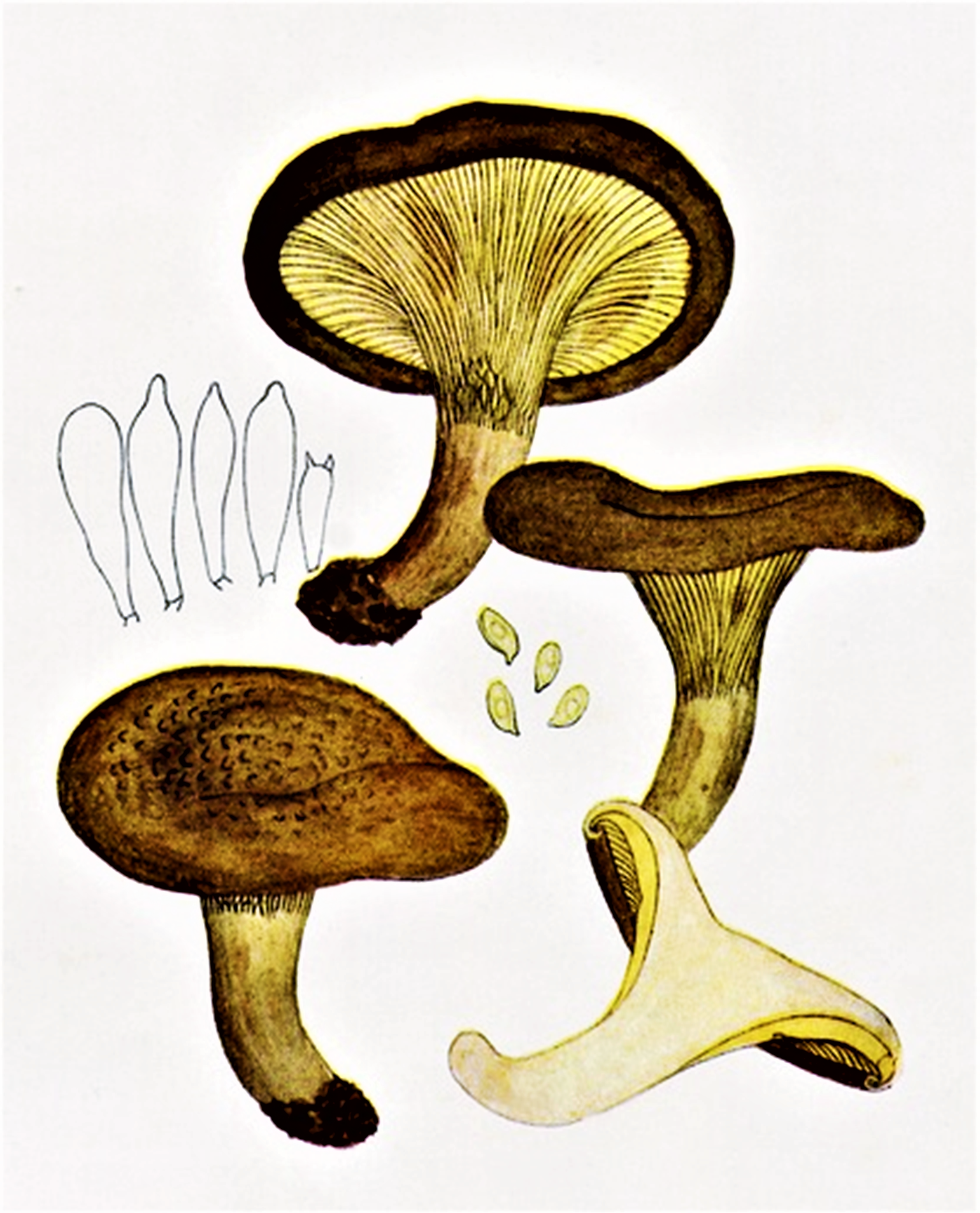 Giacomo Bresadola: Paxillus involutus (Batsch, 1786) Fr. (1838)